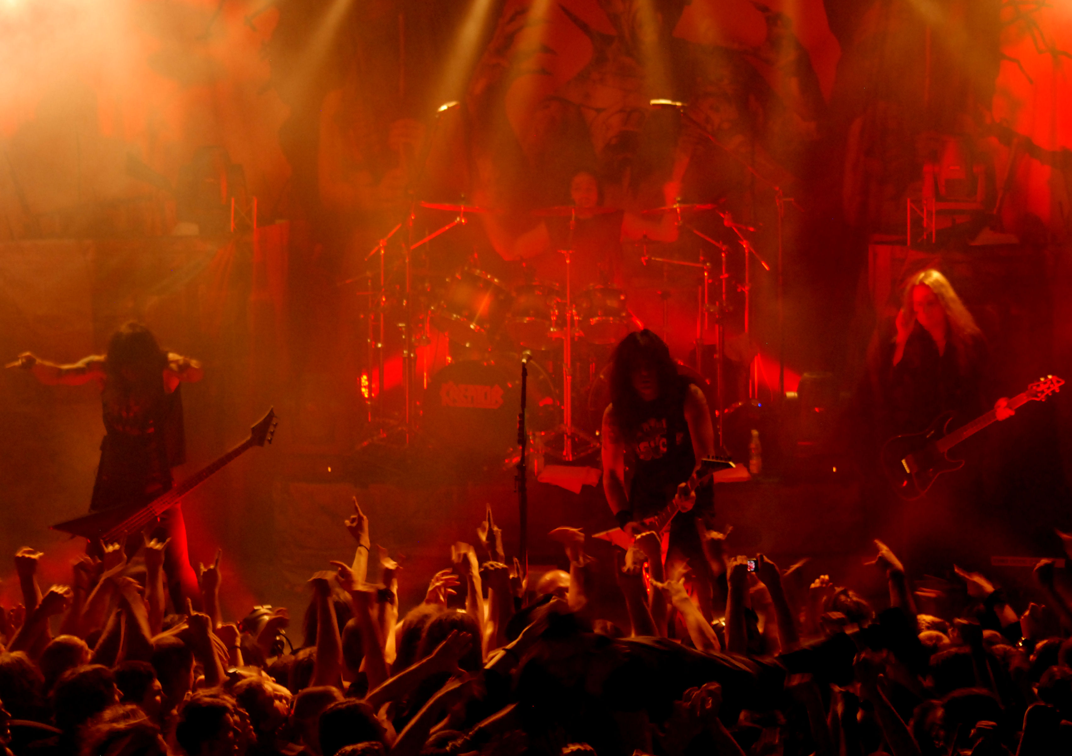 Kreator podczas koncertu w Klubie Studio w Krakowie